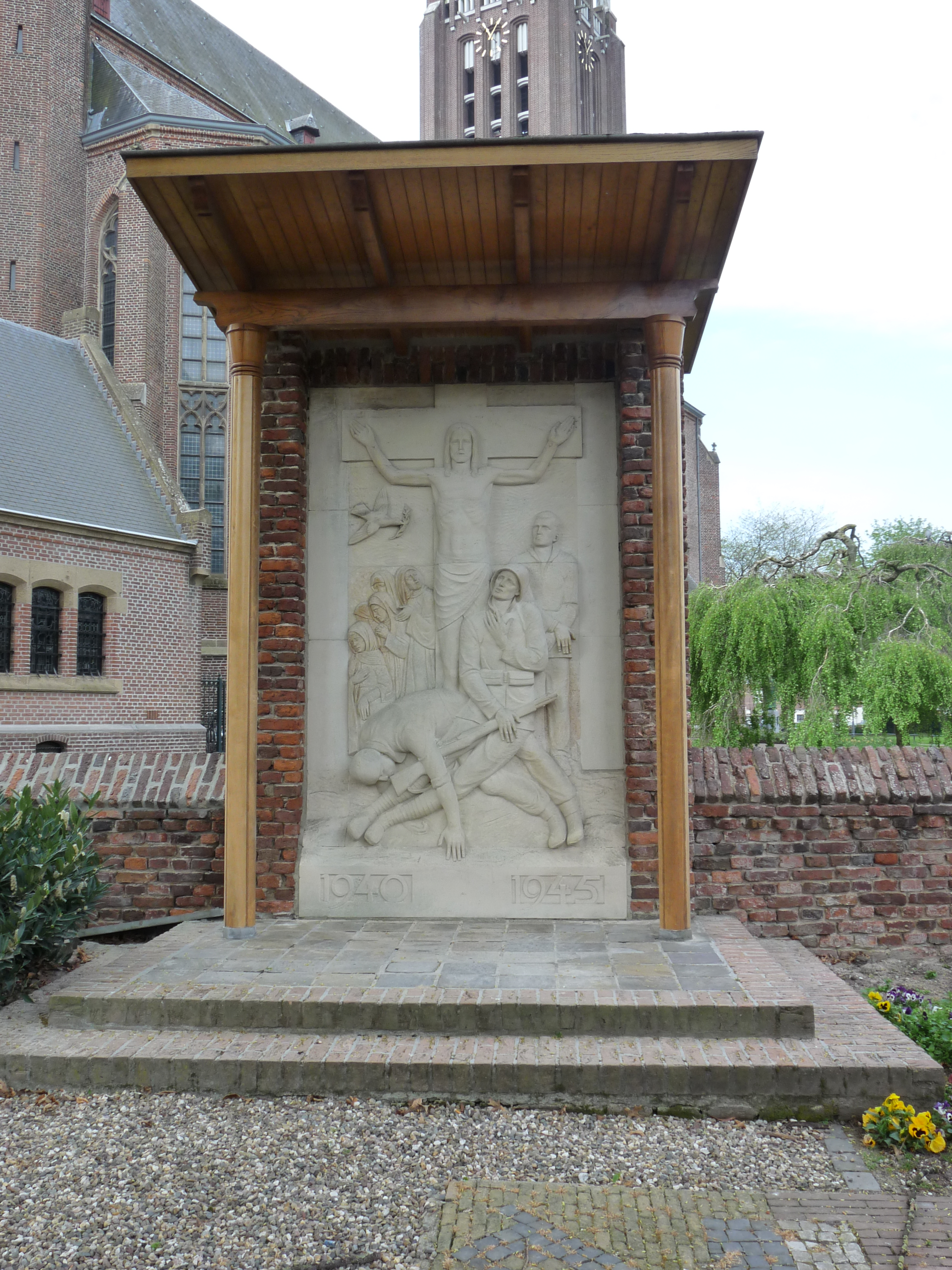 Oorlogsmonument bij de ingang van wat vroeger het kerkhof van Venray was, Ligt naast de St.PetrusBandenkerk.